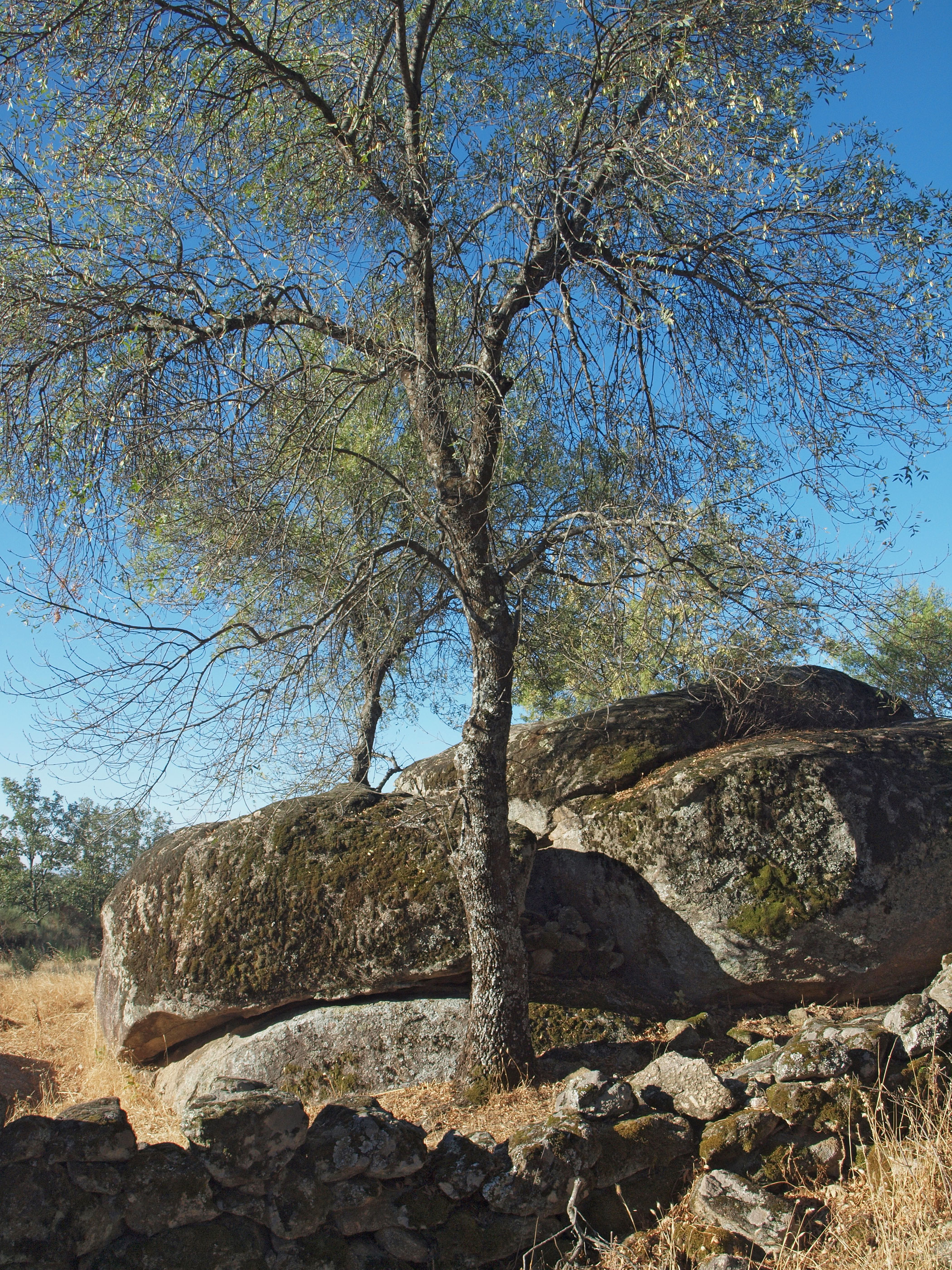 'Fraxinus angustifolia. Losar de la Vera (Cáceres, España).